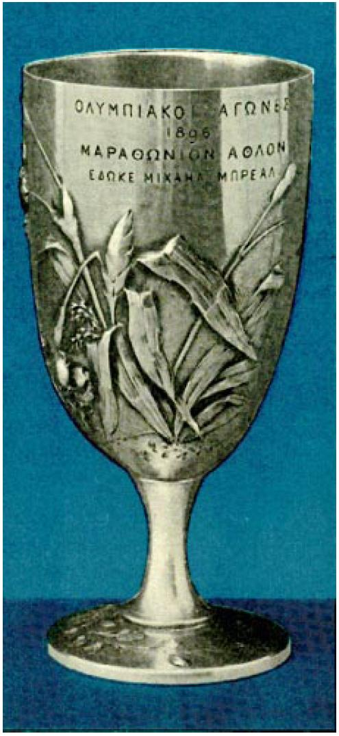 Silberpokal Marathonlauf 1896